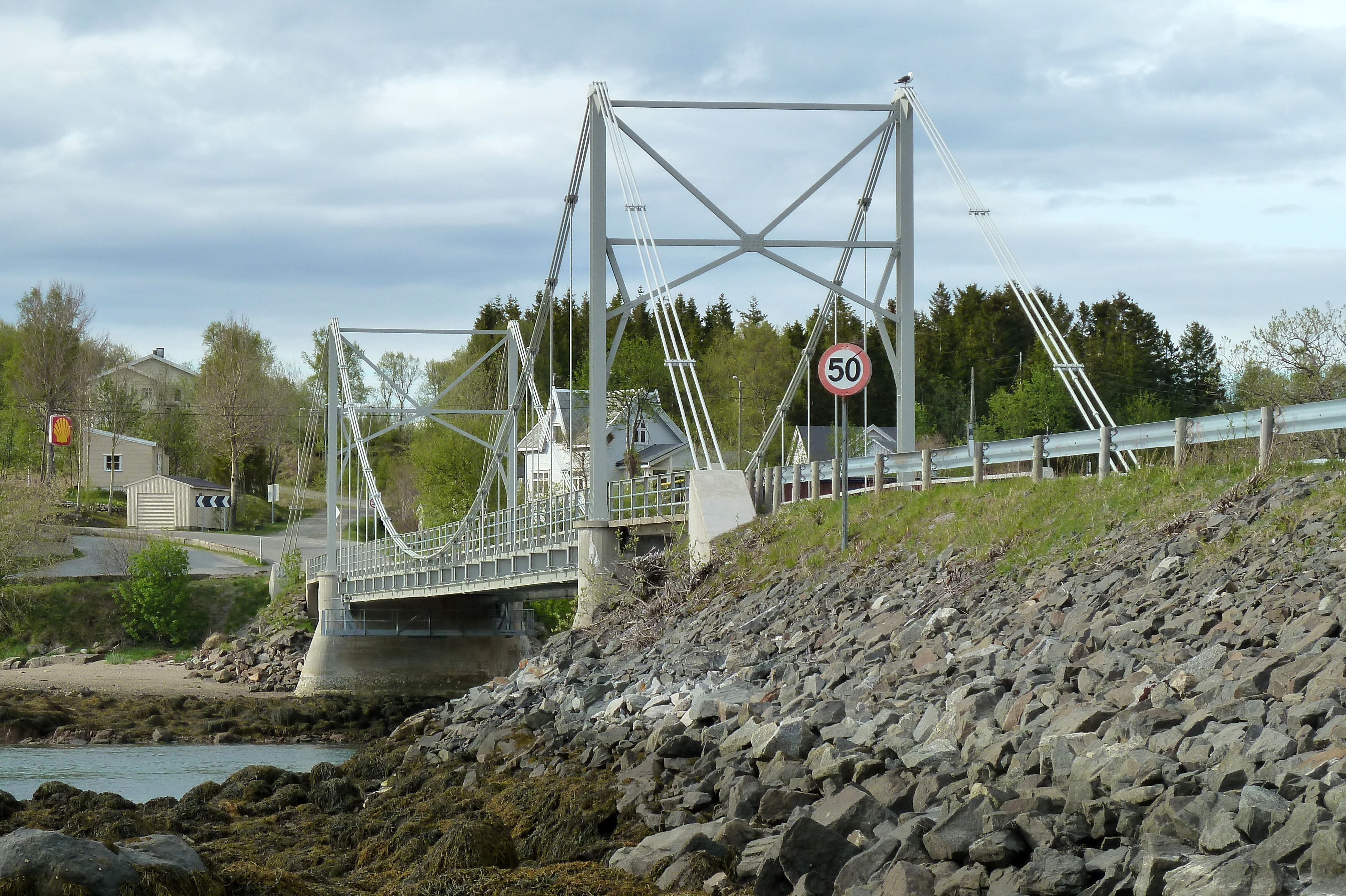 Presteidbrua i Hamarøy i Nordland.